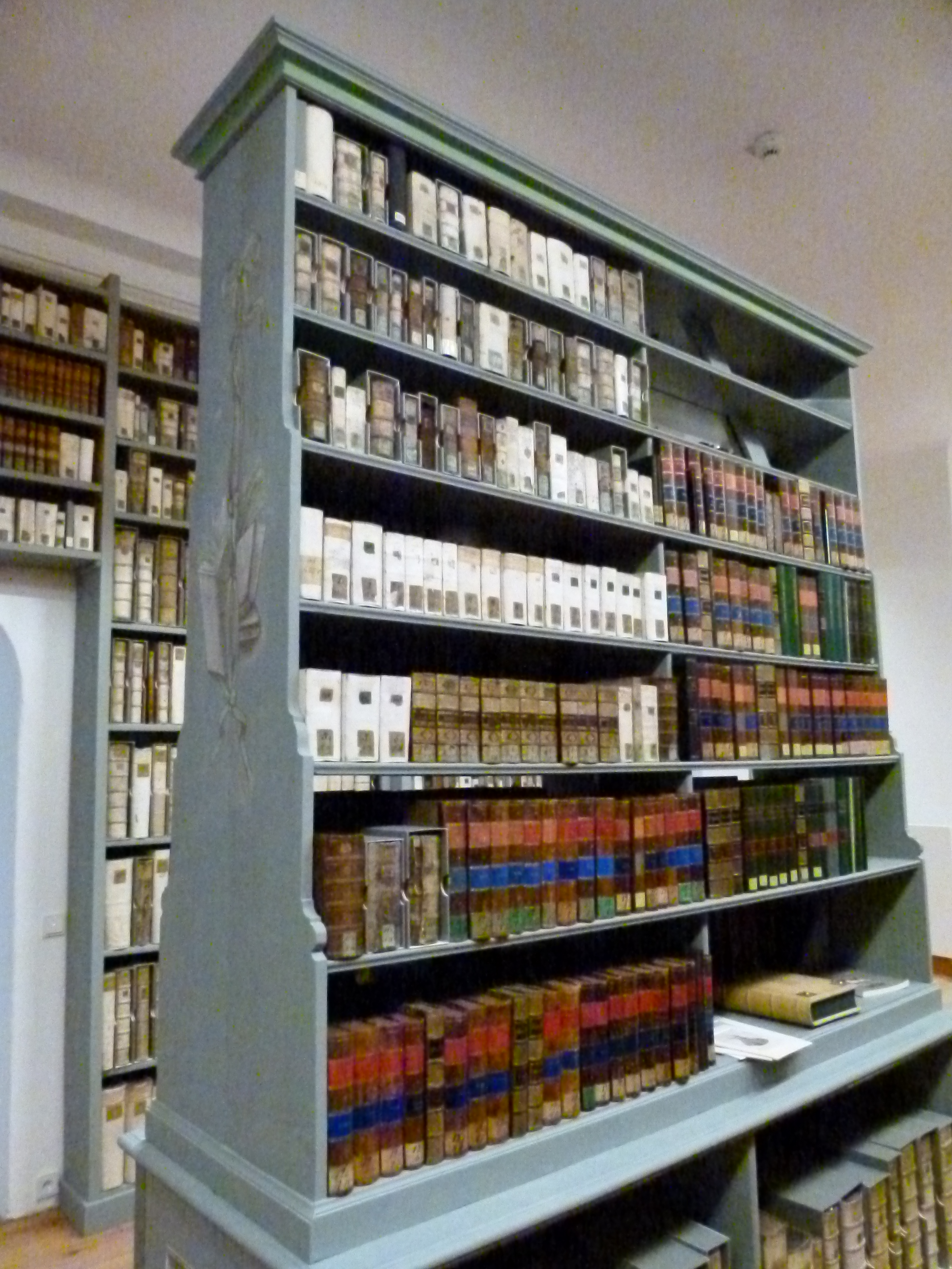 Einblicke in die historischen Bibliotheksräume der Oberlausitzischen Bibliothek der Wissenschaften